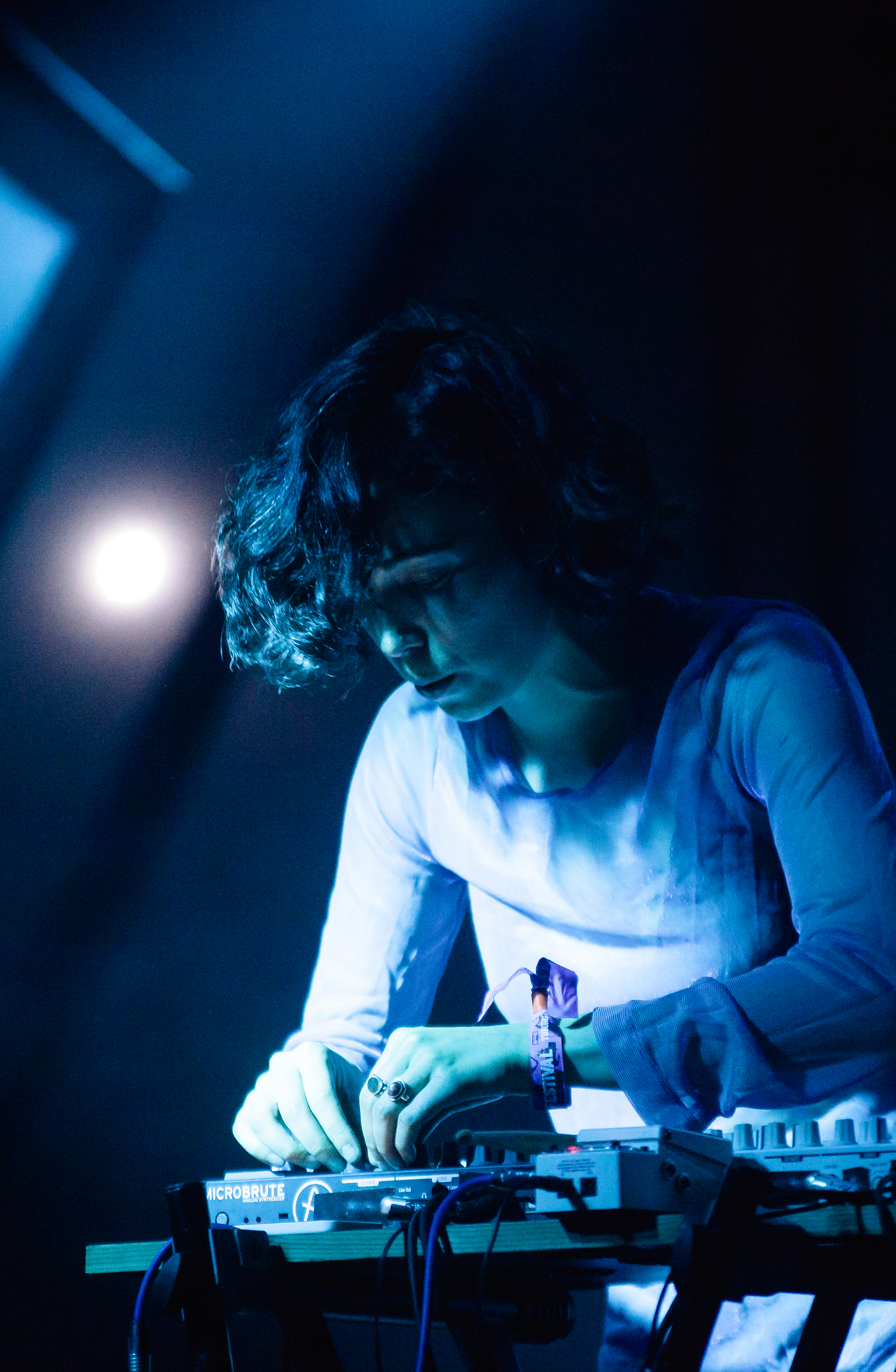 Festivalsommer This photo was created with the support of donations to Wikimedia Deutschland in the context of the CPB project "Festival Summer".